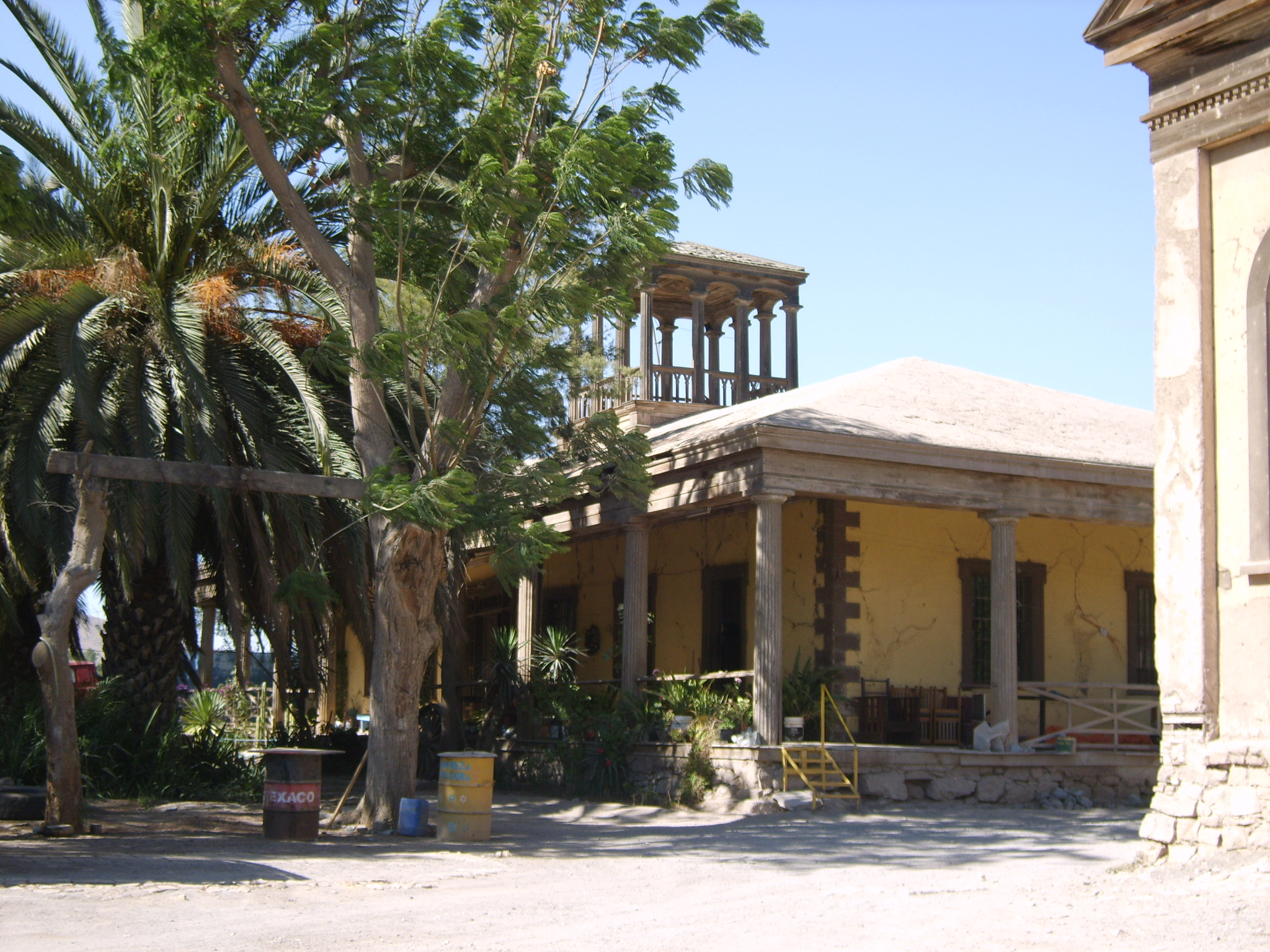 Ex-Hacienda Nantoco